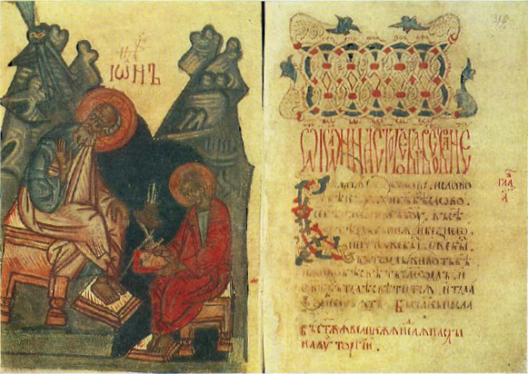 Евангеліст Іаан. Шарашоўскае евангелле. 16 ст